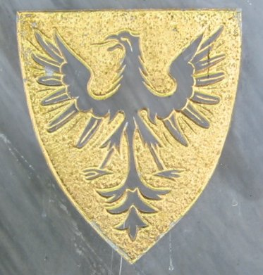 Blason du Pape Callixte II.jpg